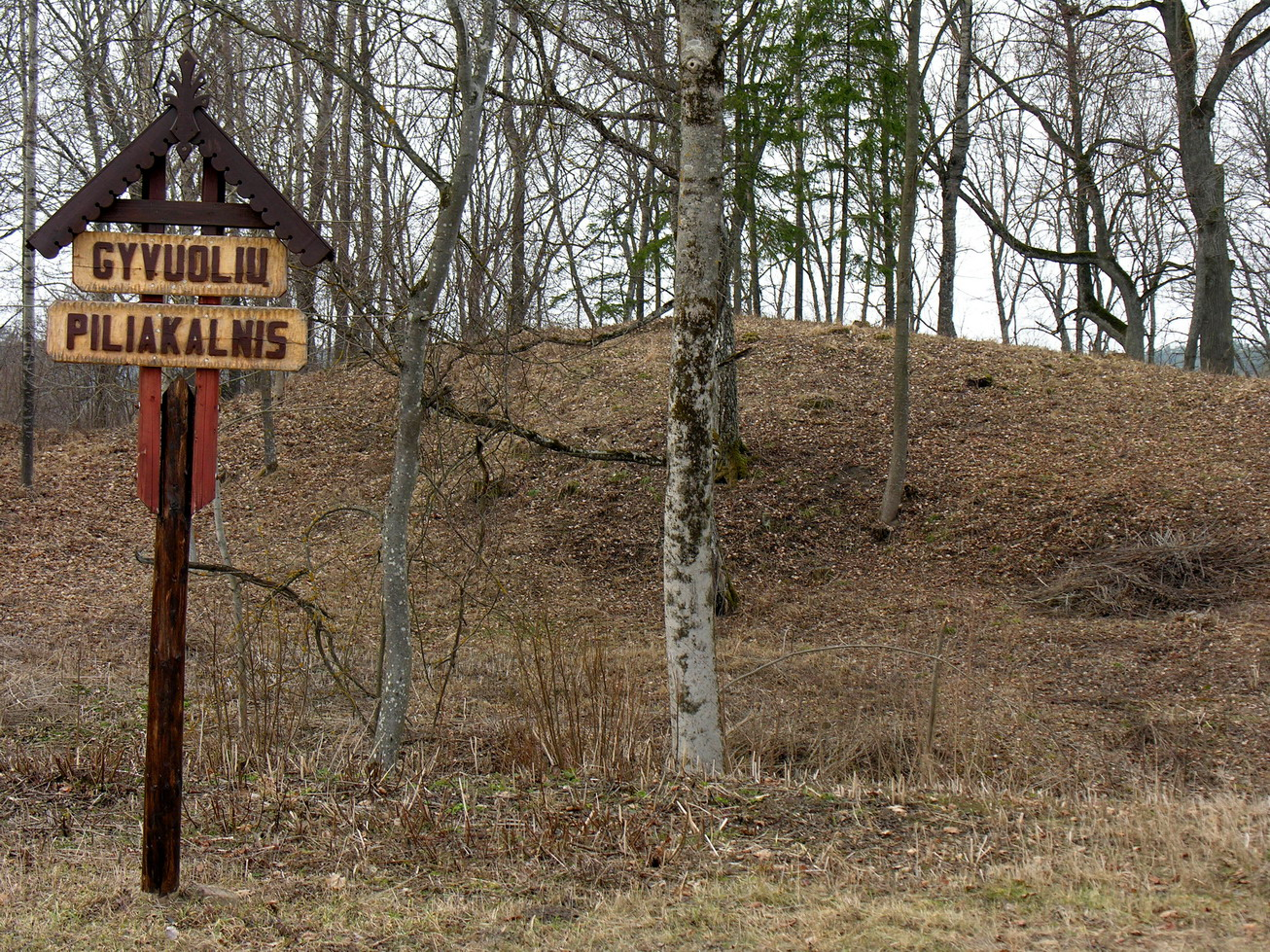 Žemaitėška: Gyvuoliu pėlekalnis Mažėikiu rajuonė Puortegrapėjė Algėrda, 2006 m. balondė 9 d., Žemaitėjė